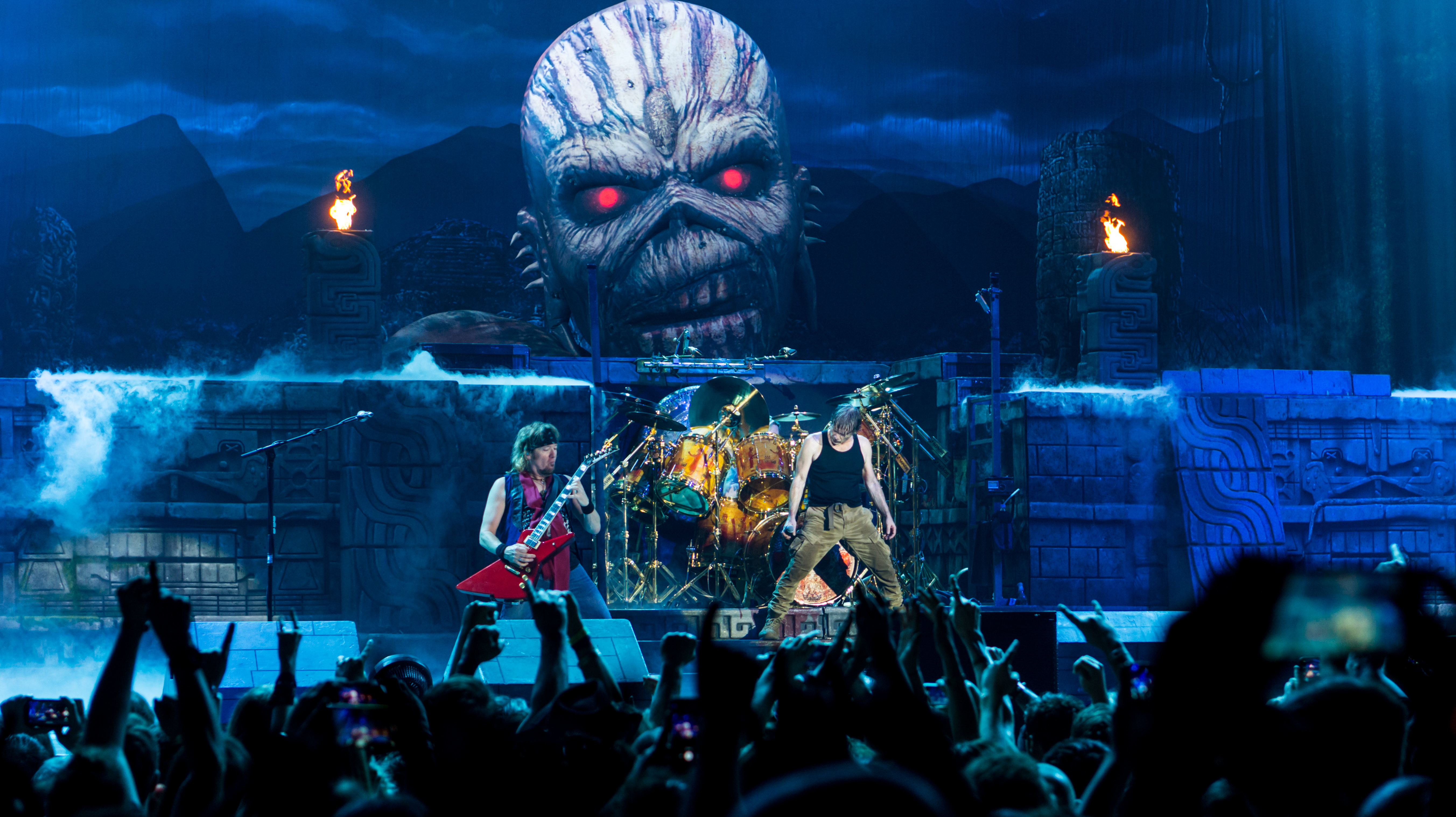 IronMaidenO2_270517-50